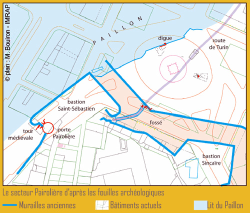 Situation des remparts de la ville ville par rapport à l'actuelle place Garibaldi.